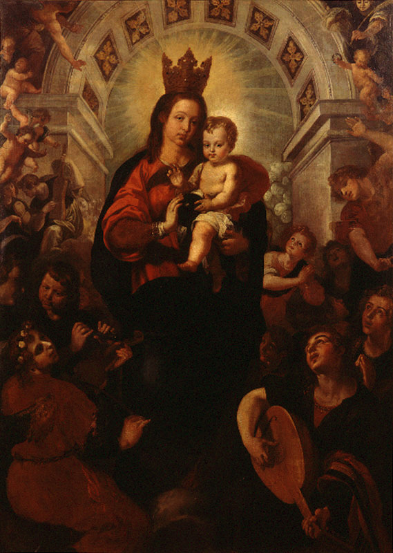 La obra representa a la Virgen María llevando en brazos a su hijo, el Niño Jesús, y procede del retablo de la Cartuja de Porta Coeli.